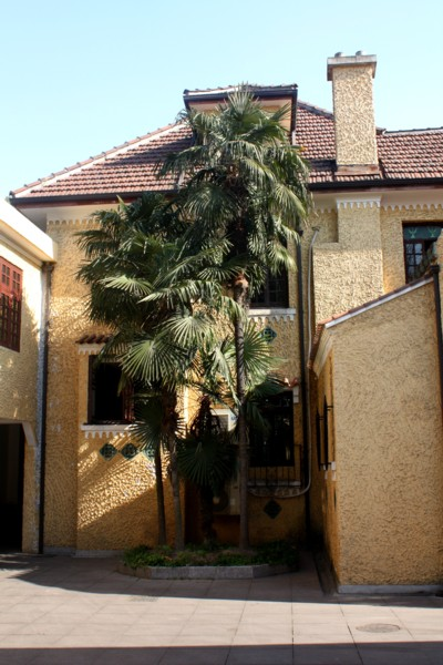 Shanghai, siehe [1]